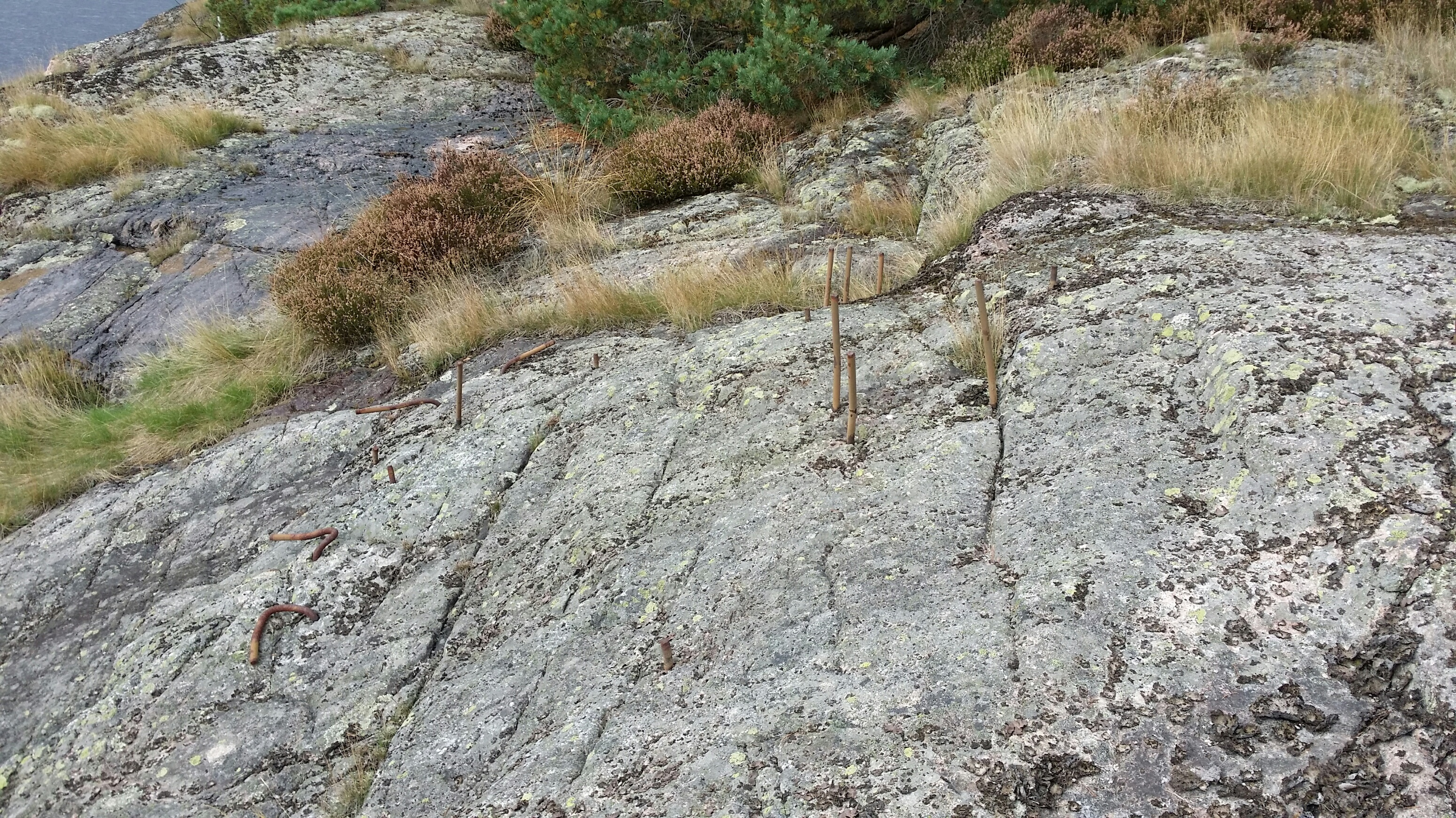 Rester etter luftvernutstyr fra annen verdenskrig.